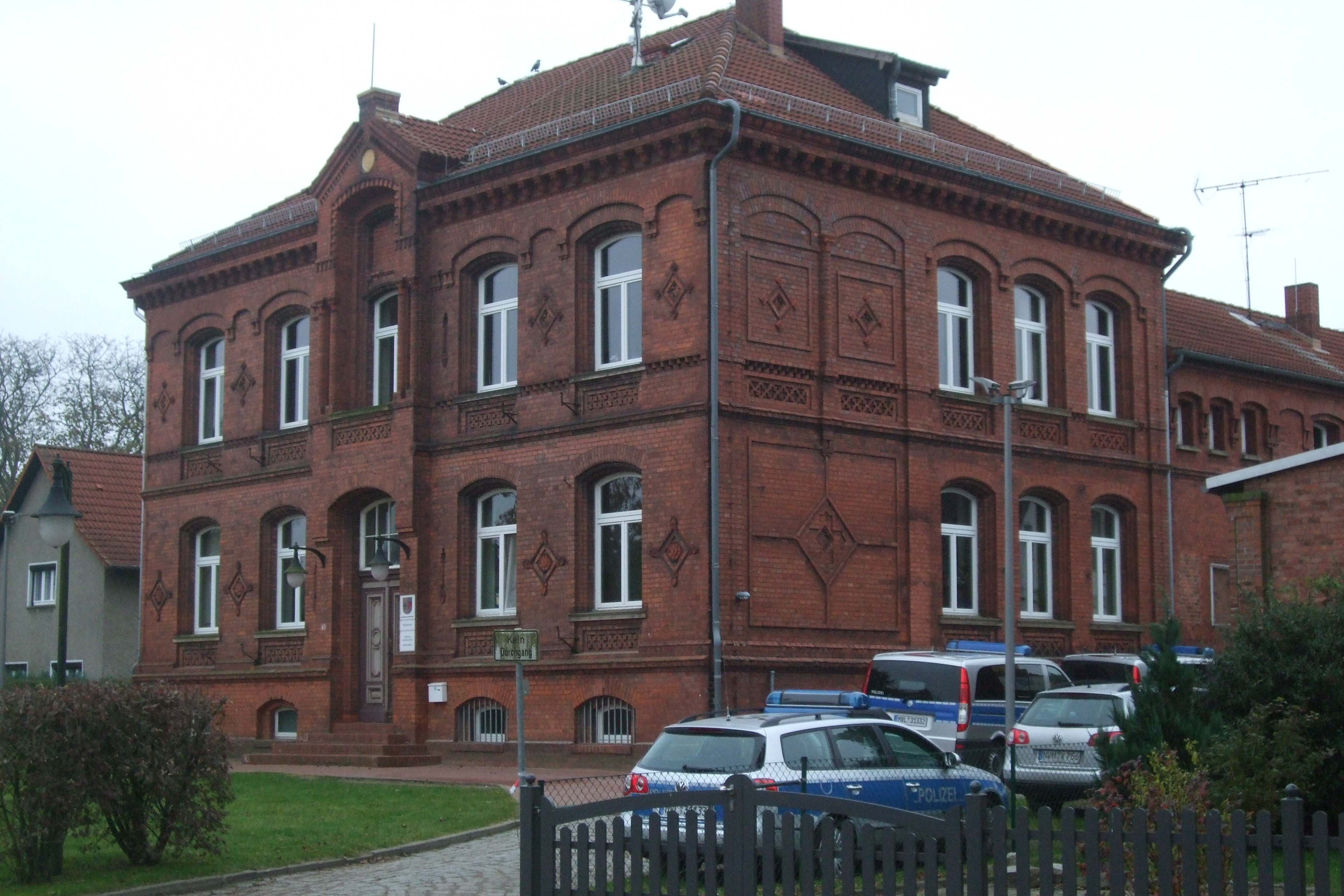 Alter Wall 43; ehem. Großherzogl. Amtsgericht